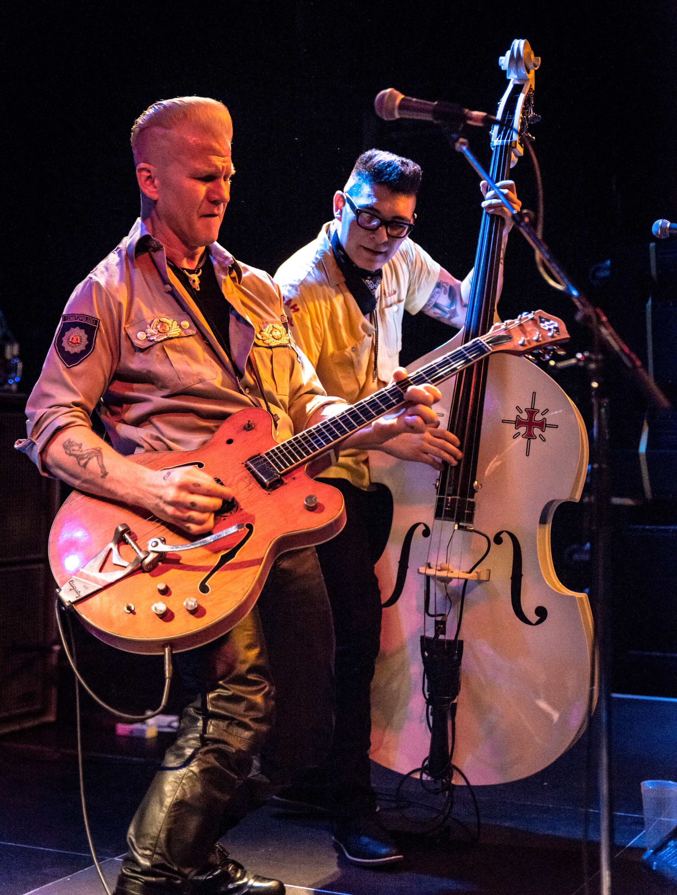 de